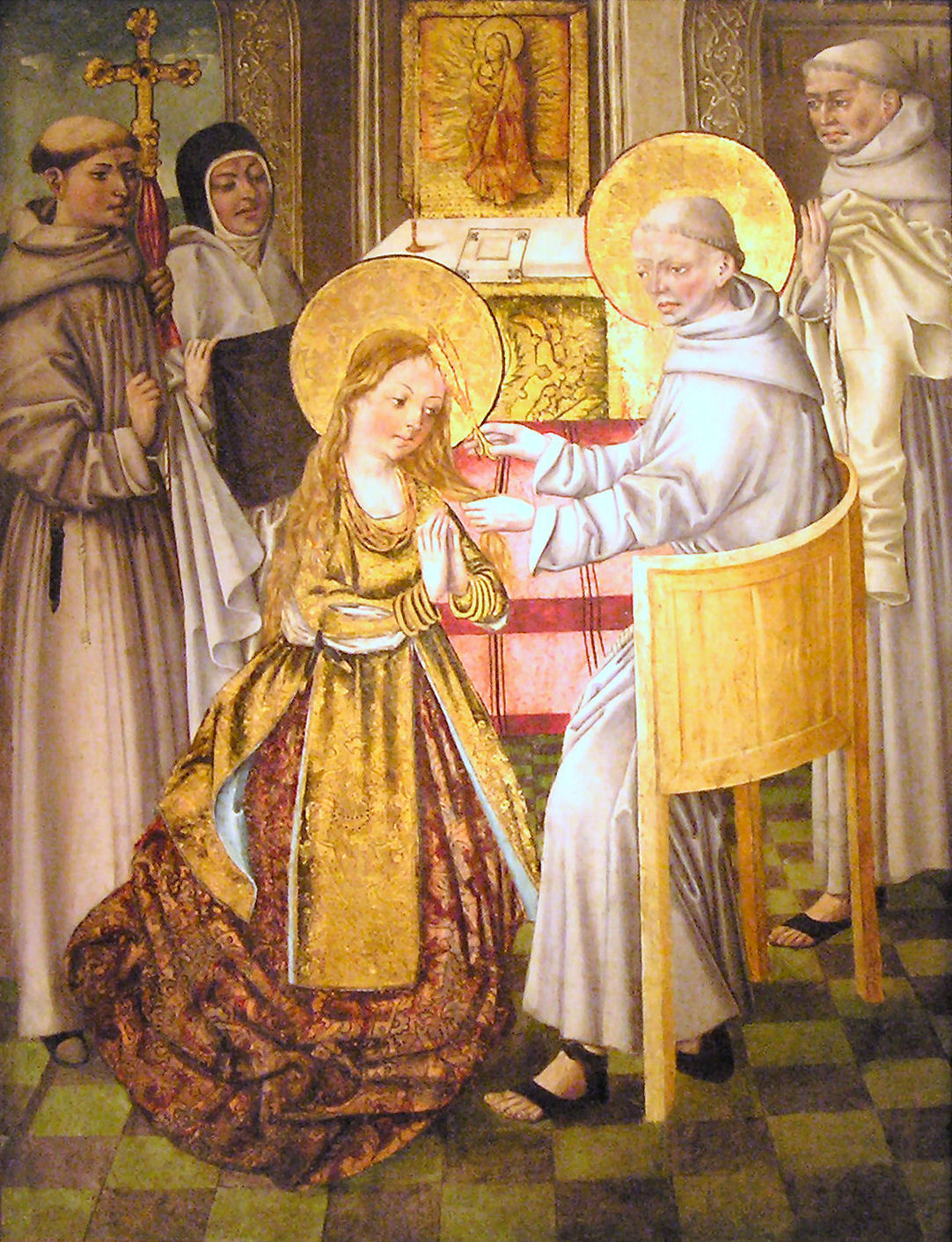 (Berlin, Deutsches Historisches Museum): Der Eintritt der heiligen klara ins Kloster